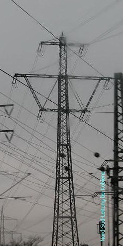 C1-Mast der Nord-Süd-Leitung westlich der Rheinkreuzung in Koblenz